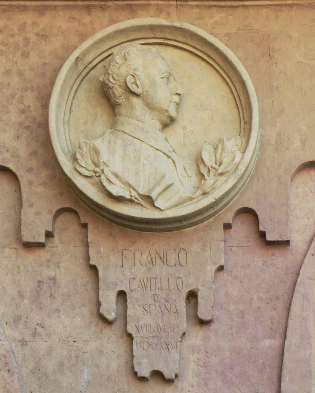 Medallón atribuido a Miguel Huerta con la efigie de Francisco Franco ha sido incrustado en 1937 en el Pabellón Real de la Plaza Mayor de Salamanca. El medallón ha sido retirado el mes de junio 2017 en cumplimiento de la Ley de Memoria Histórica, para cerrar así una presencia pública ininterrumpida de ochenta años.